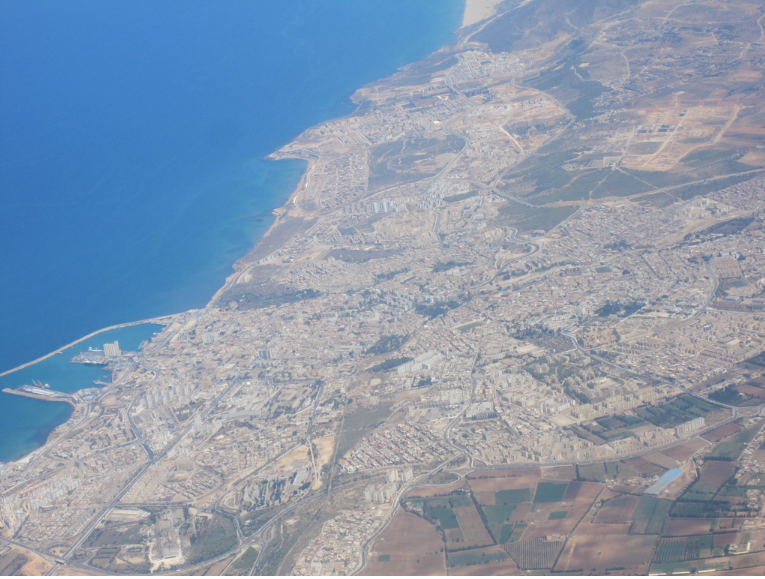 Mostaganem